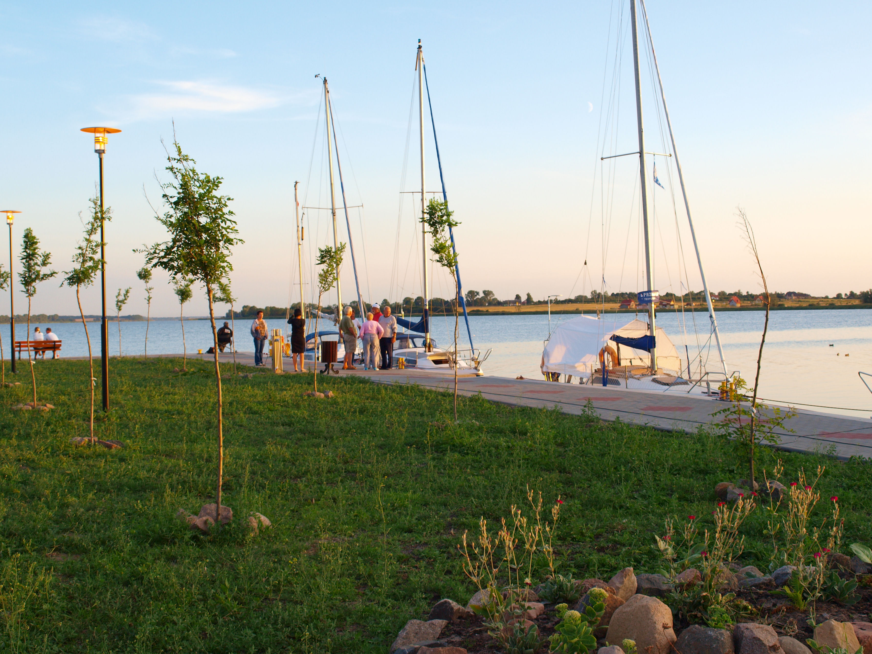 Międzywodzie"Zatoka Kamieńska"